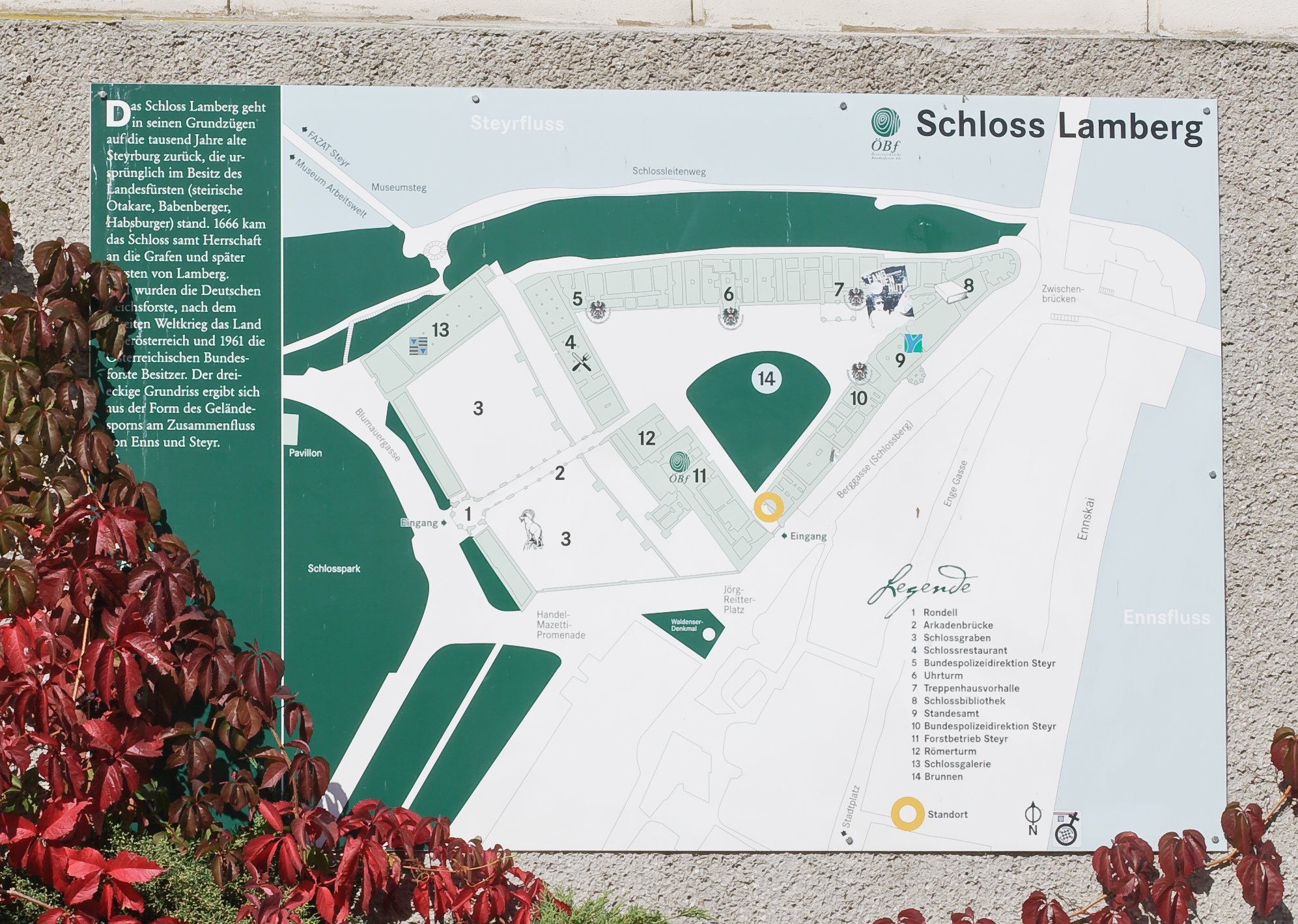 Eine Infotafel rechts neben dem Hauptportal von Schloss Lamberg (Berggasse/Schlossberg).